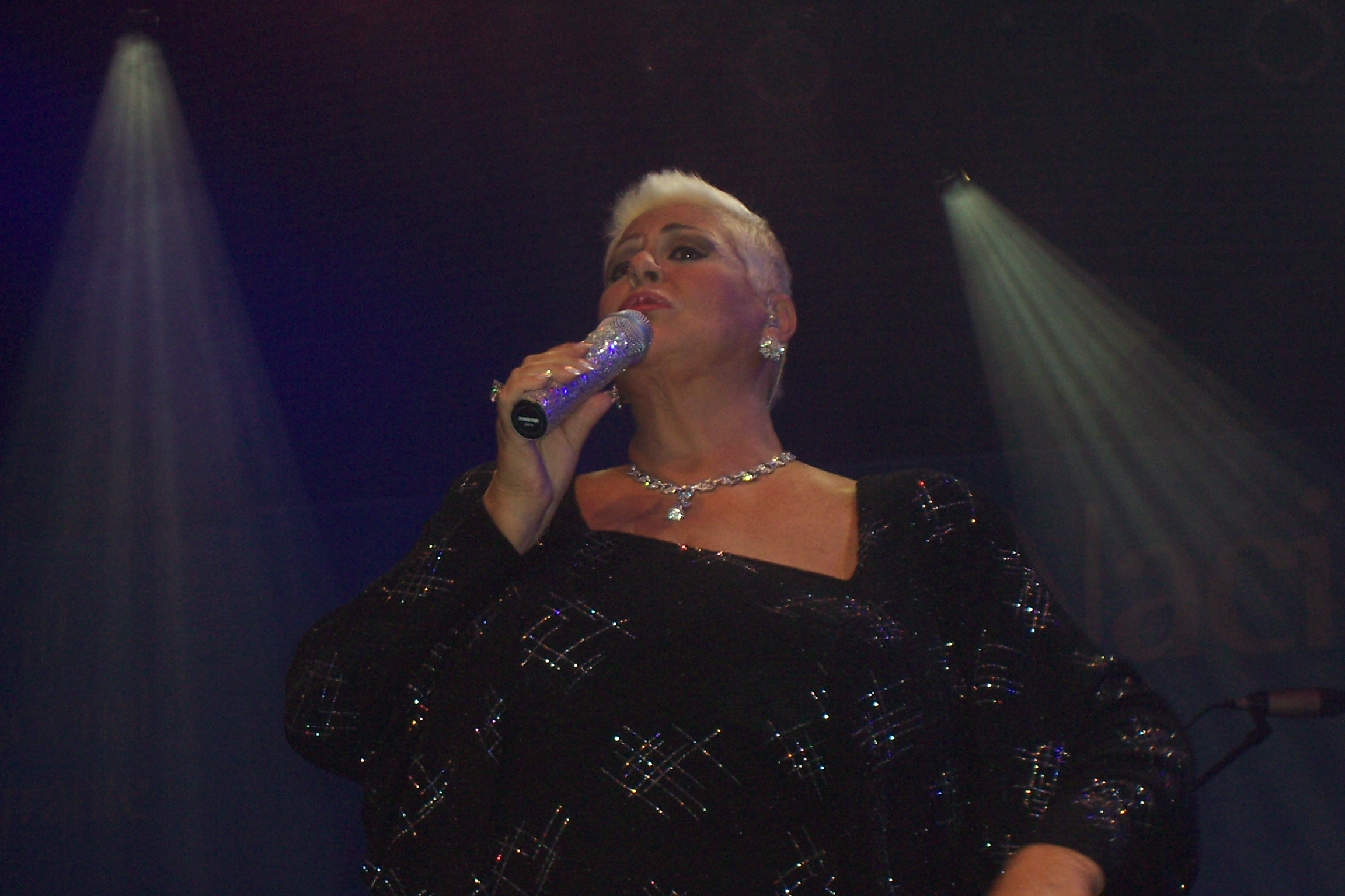 María Marta Serra Lima en la Fiesta Nacional del Inmigrante, realizada en la ciudad de Oberá, Misiones. Año 2007.